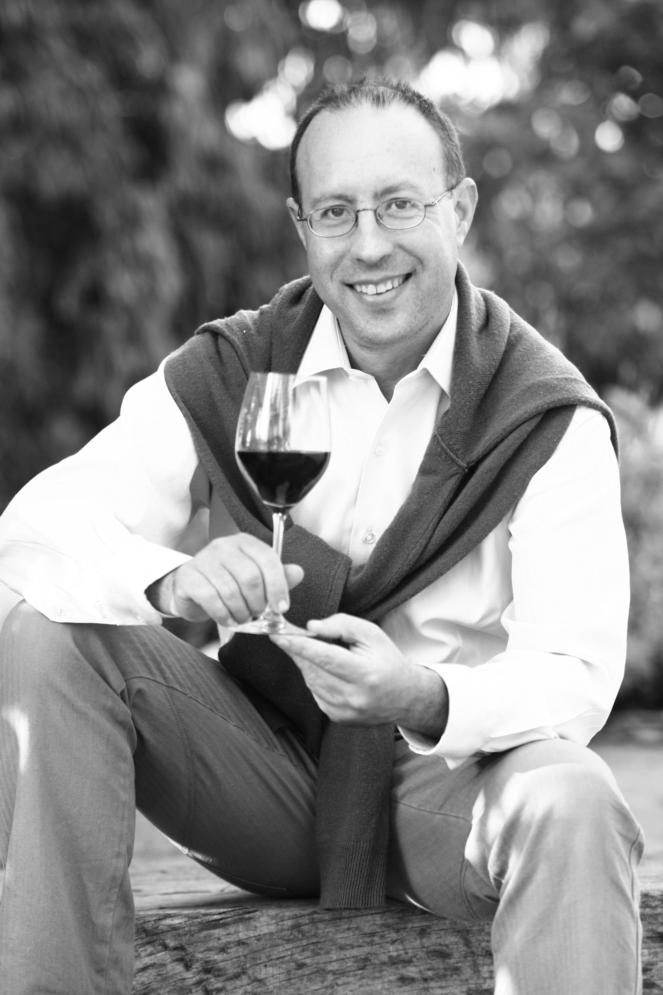 טל גל כהן